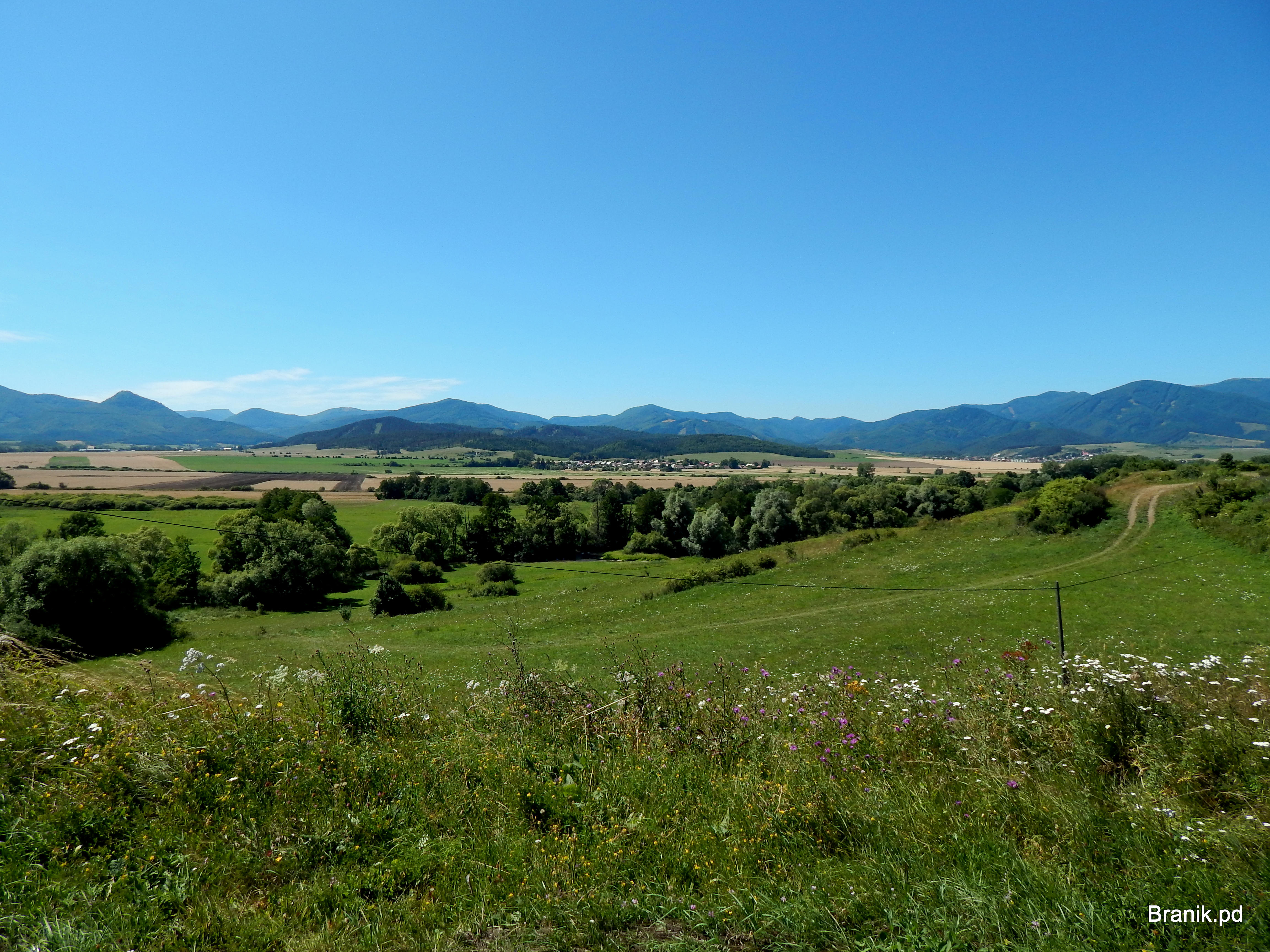 038 43 Laskár, Slovakia